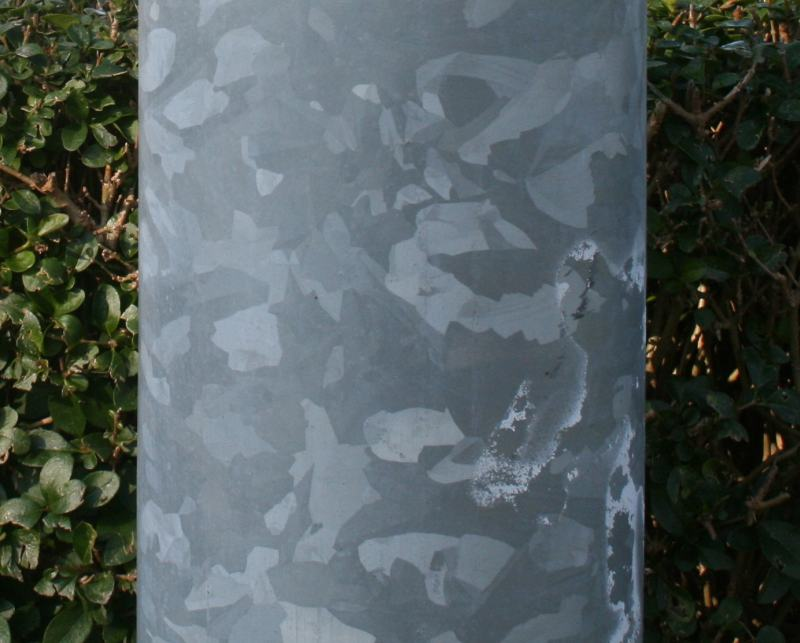 typisch uitzicht van verzonken oppervlak